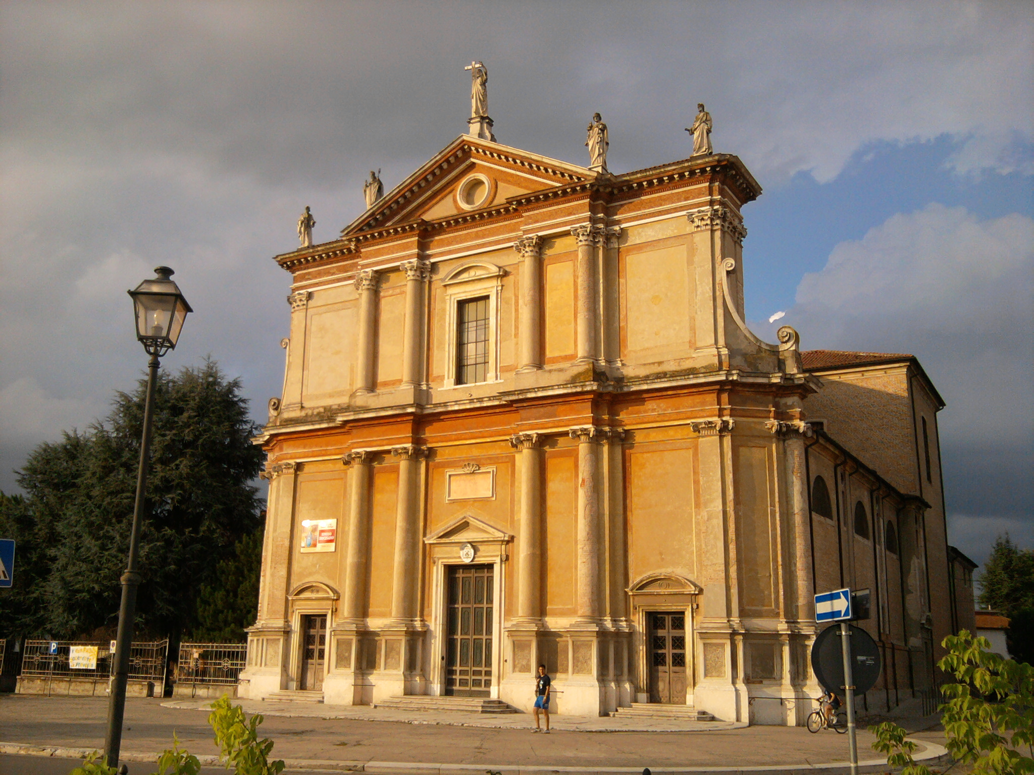 Lendinara: Facciata del Duomo di Santa Sofia.